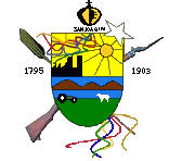 Escudo del municipio San Joaquín. Estado Carabobo. Venezuela